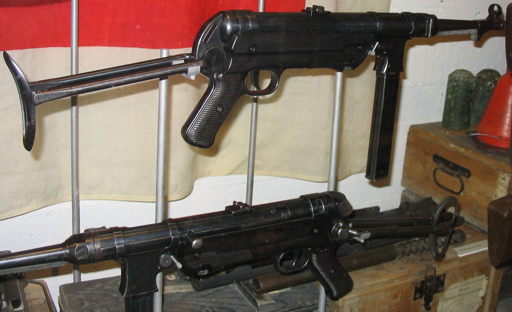 German MP 40 Schmeisser machinpistol. World War II. Skanderborg Bunker Museum, Denmark - 2004